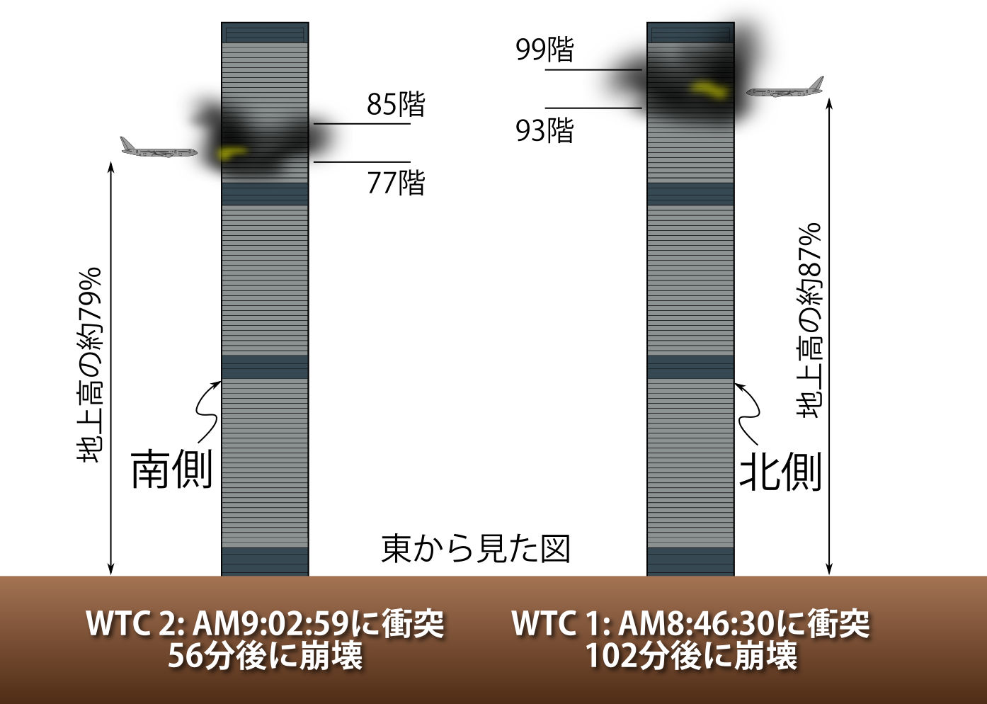 世界貿易センタービル 9.11テロ（アメリカ同時多発テロ事件）の衝突場所を水平視点で見た図。Image:World Trade Center 9-11 Attacks Illustration with Vertical Impact Locations.svg(15:08, 5 March 2007)を日本語に翻訳。原典はアメリカ国立標準技術研究所(NIST)のFile:World Trade Center 9-11 Attacks Illustration with Vertical Impact Locations.jpg.